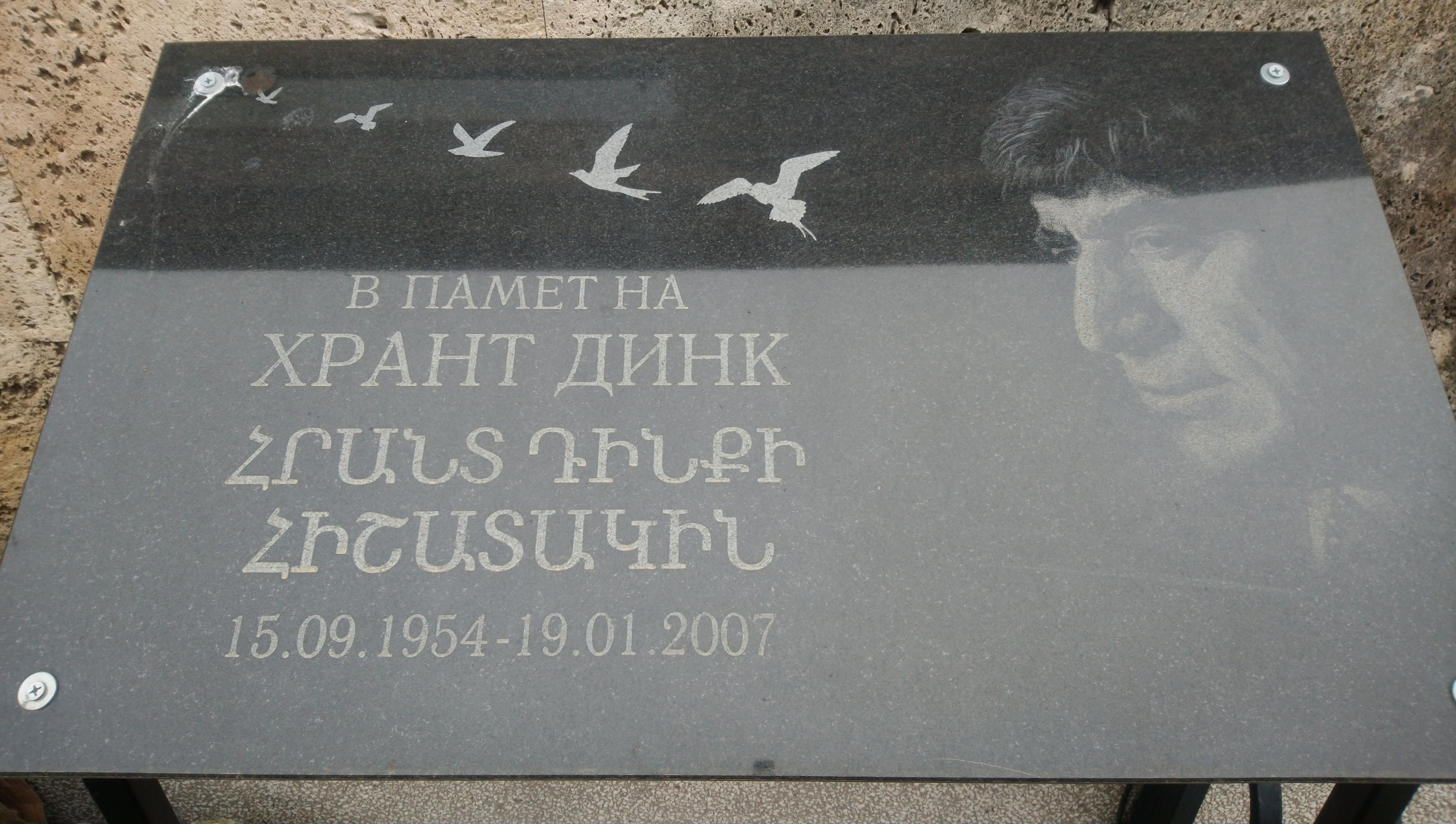 Hrant Dink memorial plaque, Burgas